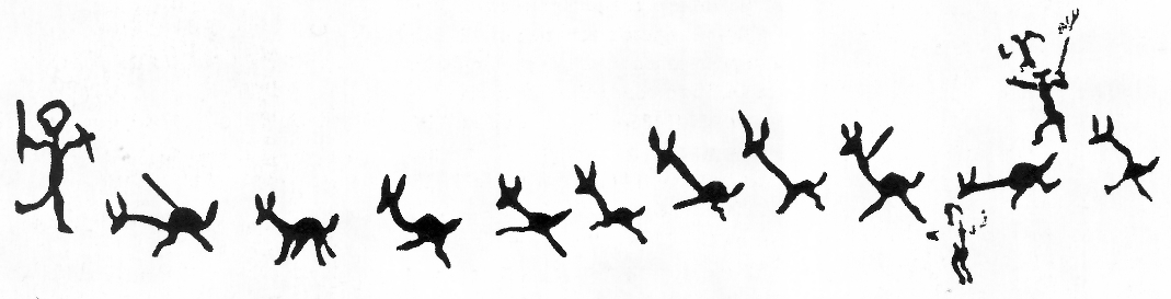 Dibujo de una pintura rupestre hallada en la cueva de Chaclaragra, en Lauricocha. 10.000 a.C.